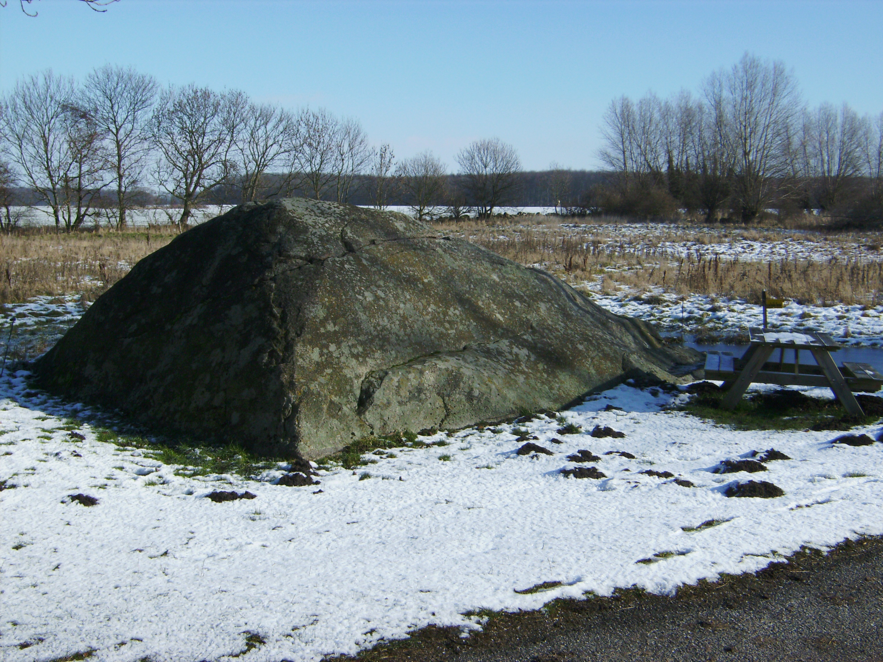 Høvænge er et afvandet område øst for Nysted på Lolland. Lolland største sten, ført hertil med isen for mere end 10000 år siden The biggest sone on Lolland (Denmark) placed here during the Iceage 10000 years ago